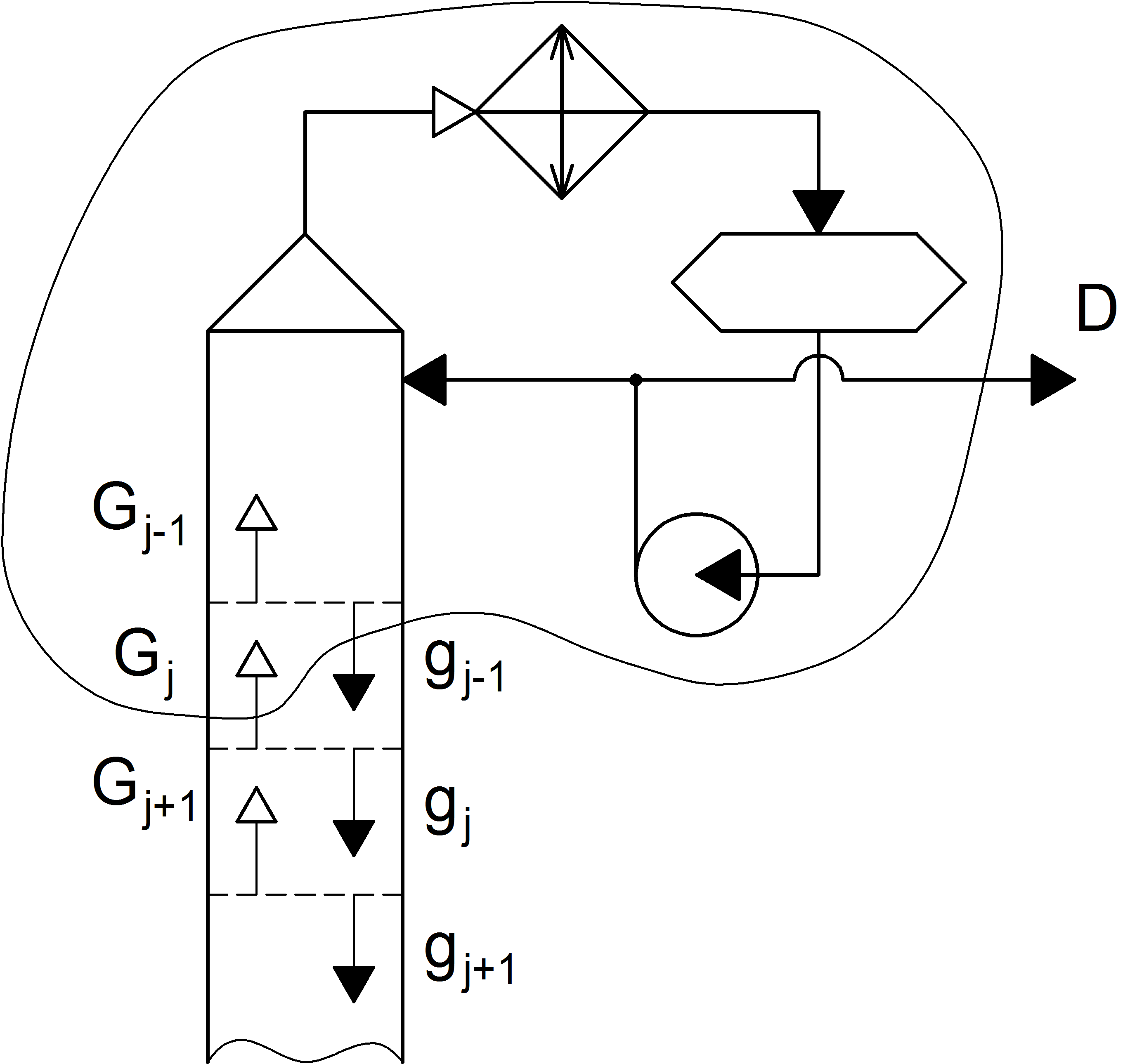 Схема для описания понятия флегмового числа